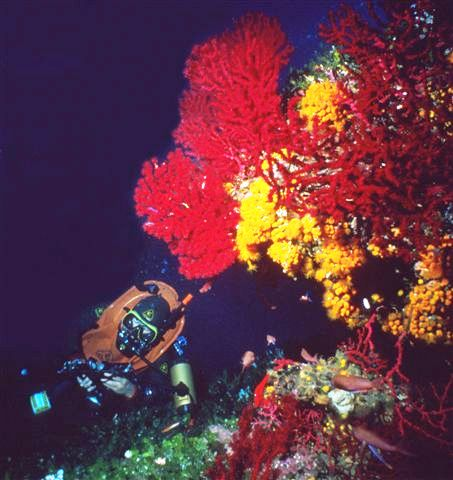 Finistruna, Area Marina Protetta Capo Gallo, Palermo, Sicily Paramuricea clavata, Astroides calycularis, Anthias anthias